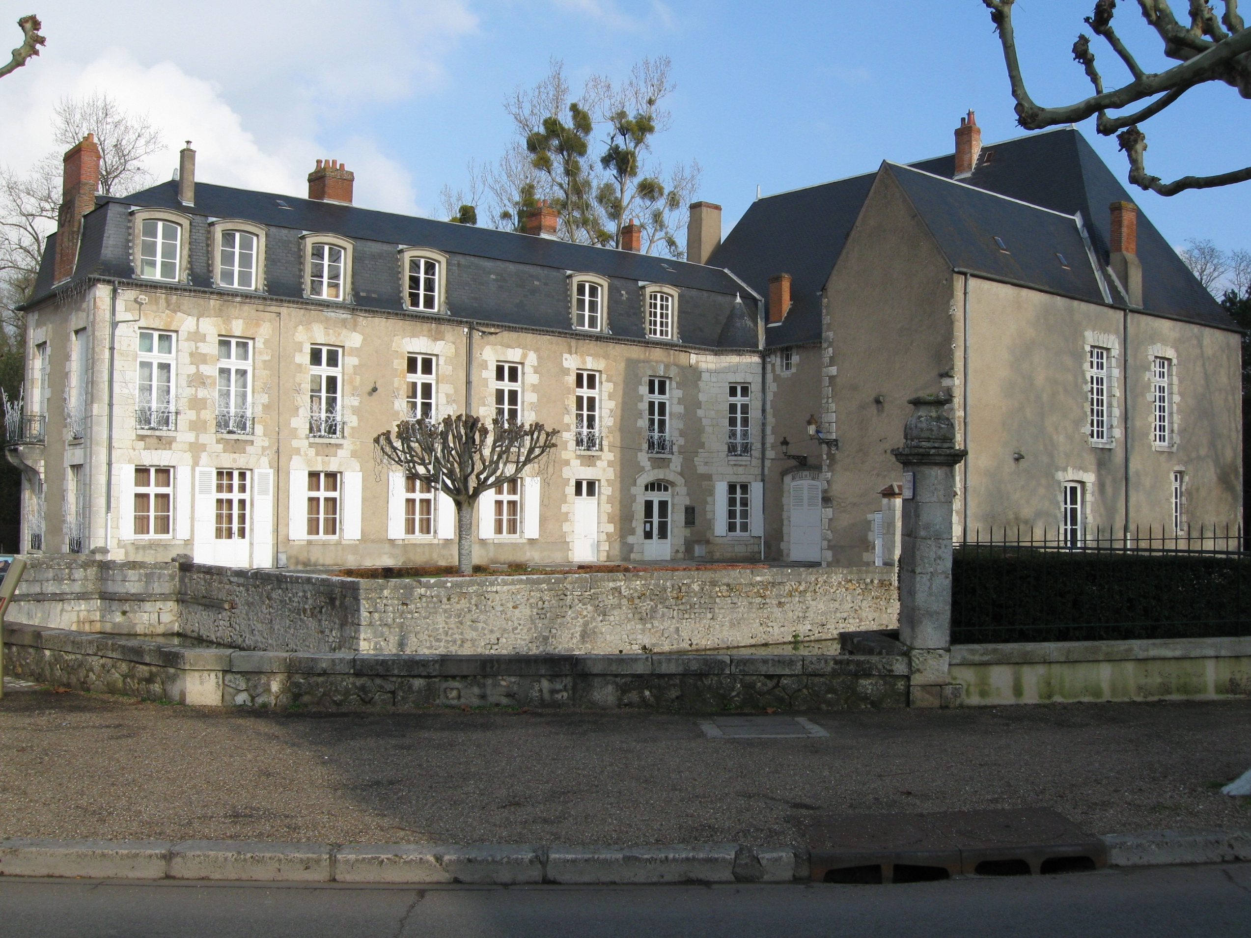 Briare, la mairie.